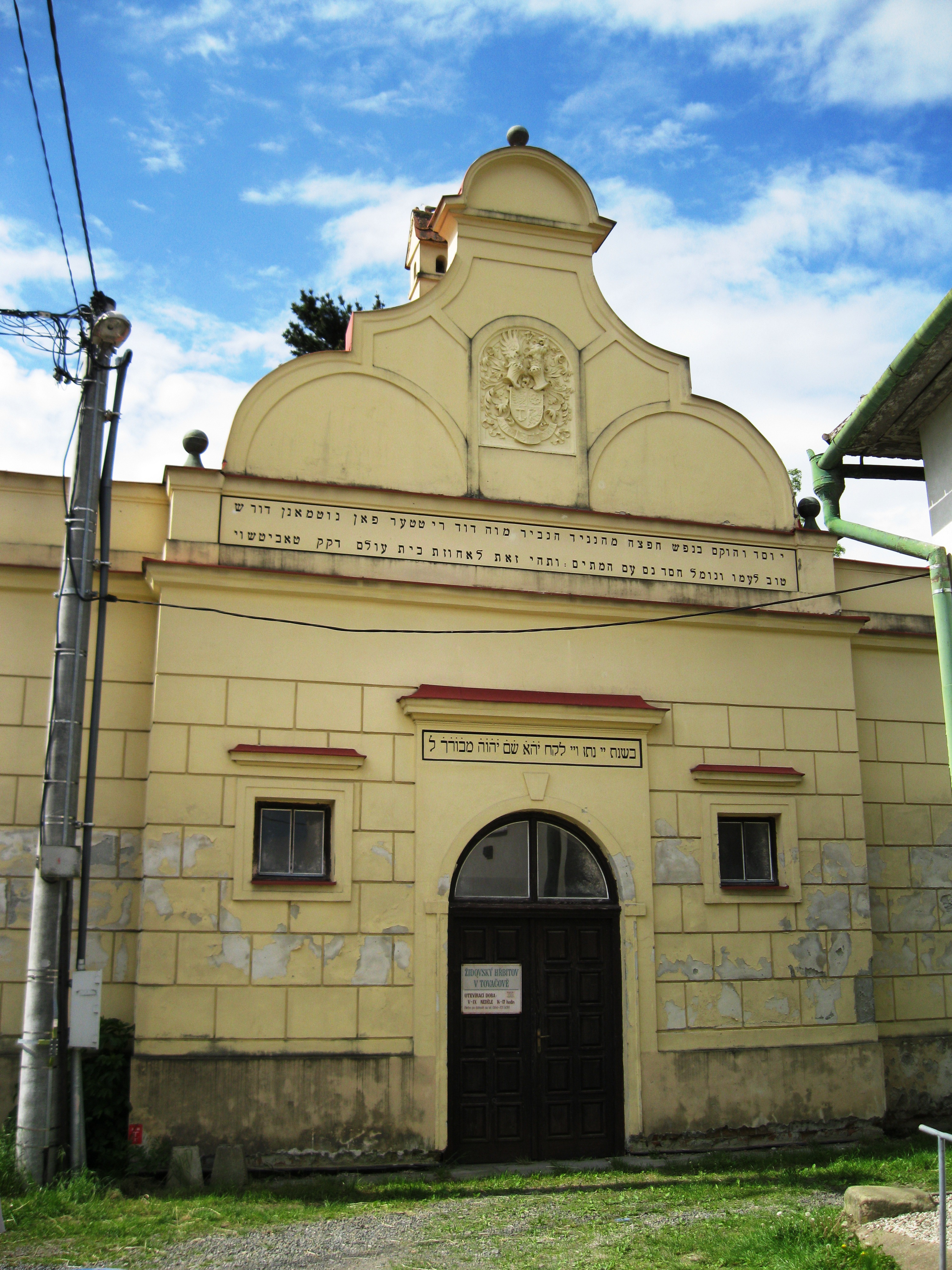 Židovský hřbitov (Tovačov), Podvalí, Tovačov